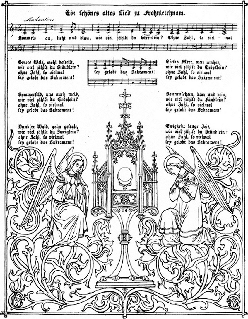 Himmelsau, licht und blau mit eucharistischer Illustration (1835)